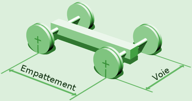 Version en français de File:Wheelbase and Track.png : empattement, voie.